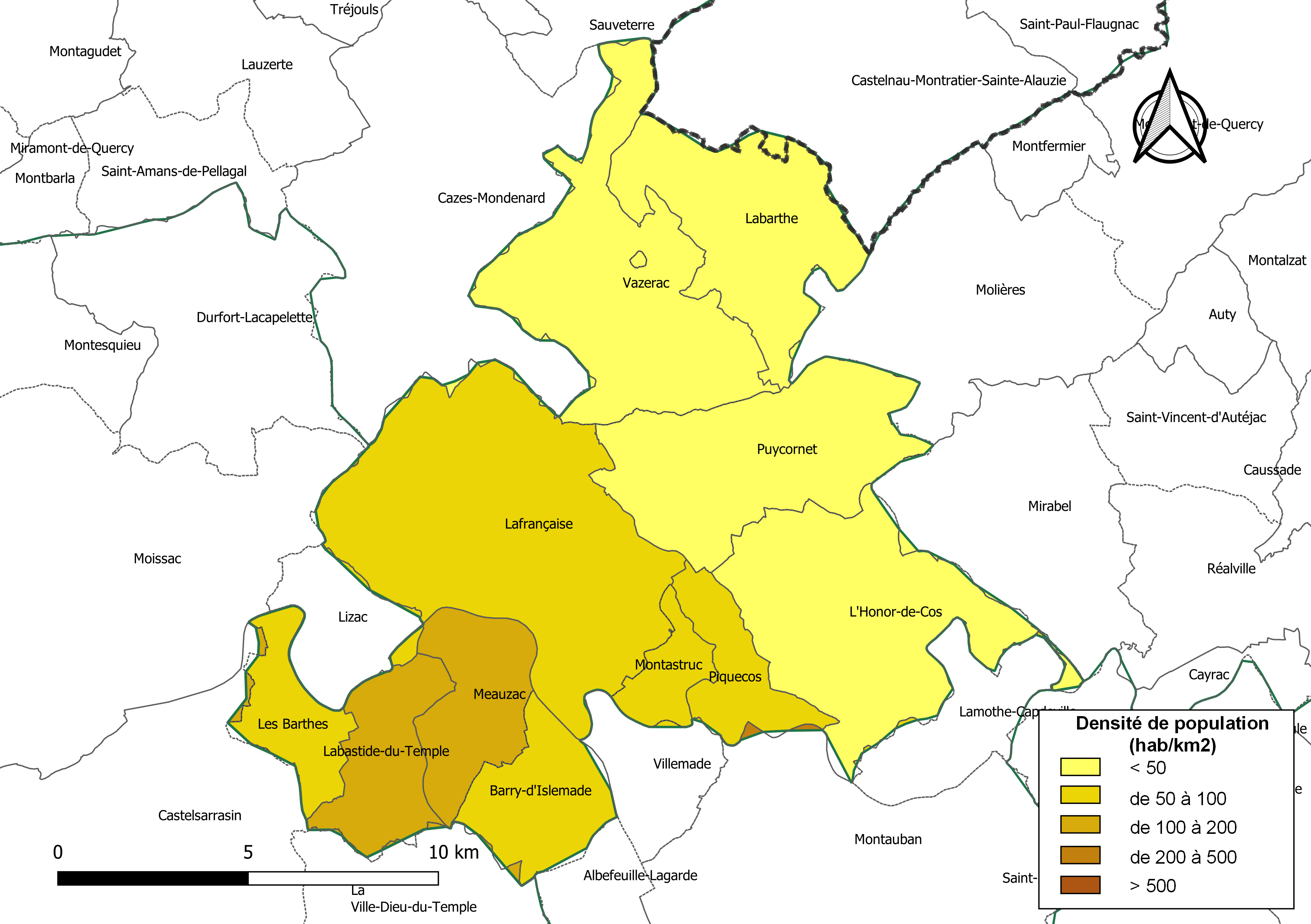 Carte des densités de population (millésimée 2016) des communes de la Communauté de communes Coteaux et Plaines du Pays Lafrançaisain, département de Tarn-et-Garonne, France. Composition au 1er janvier 2019.